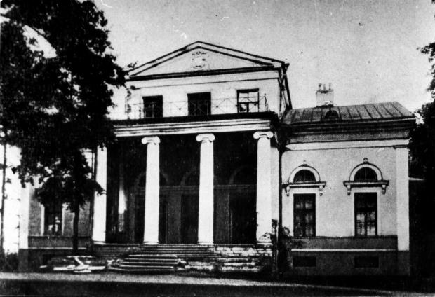 Kolomyagi Manor